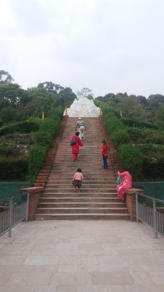 नेपाली: त्रिभुवन पार्क